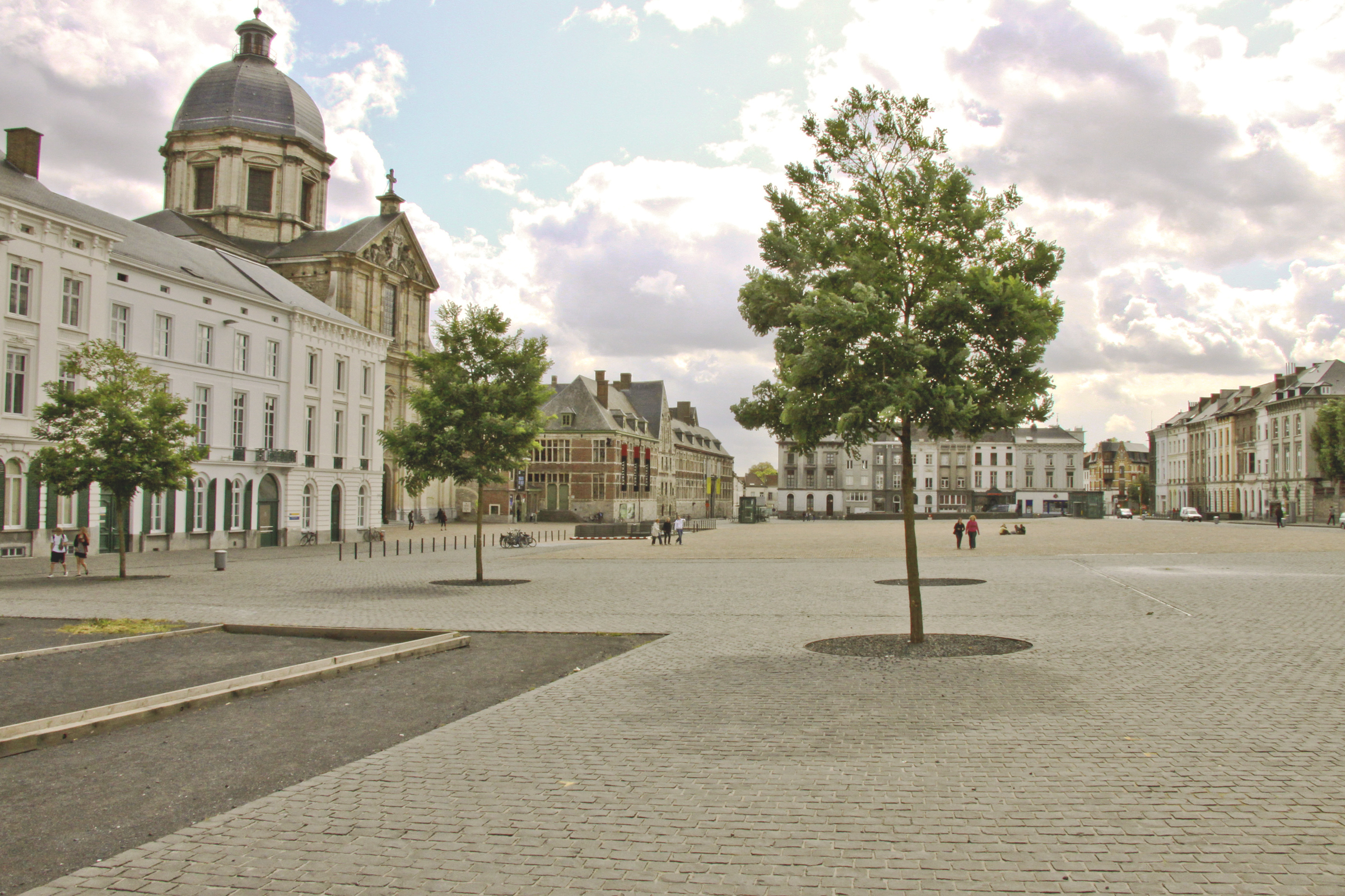 St.Pietersplein